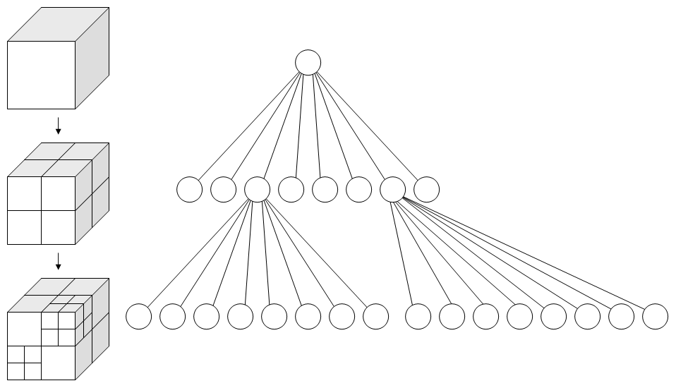 Bildbeschreibung: Schemazeichnung eines Octrees, einer Datenstruktur der Informatik. Zeichner: Nü Datum: 7. April 2006